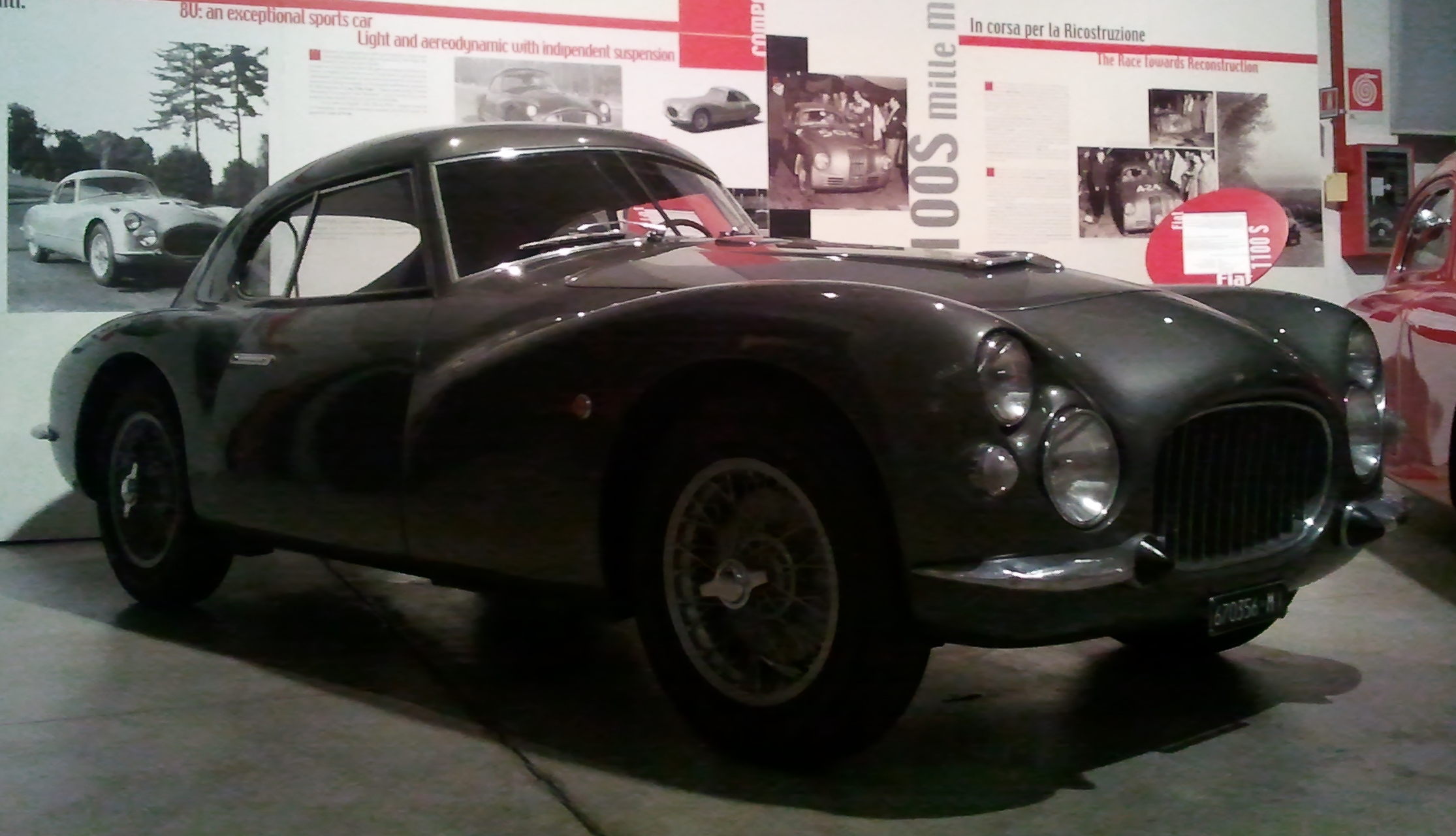 Fiat 8V en el Centro Storico Fiat